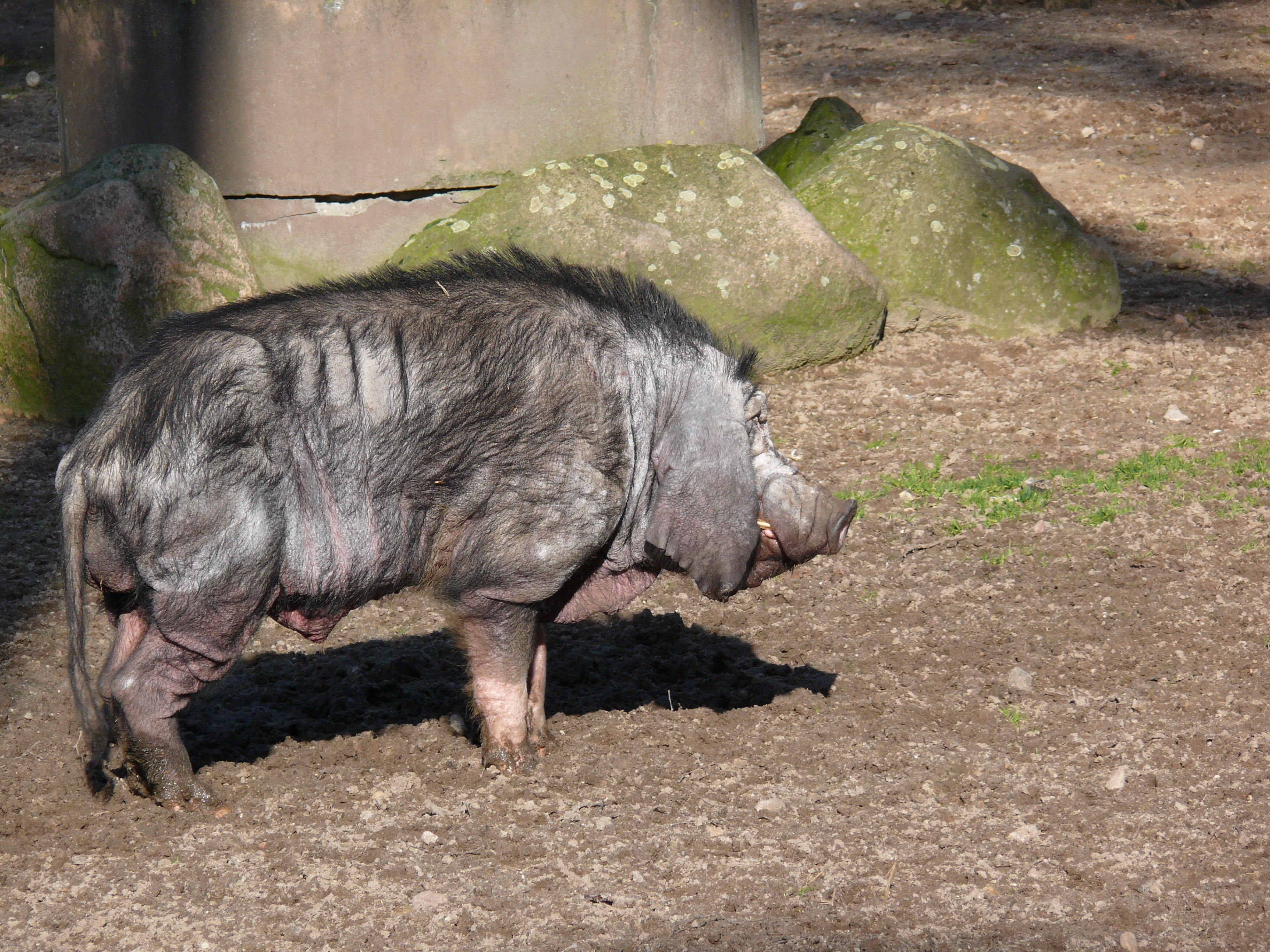 Meishan oder Maskenschwein, eine der ältesten Hausschweinrassen